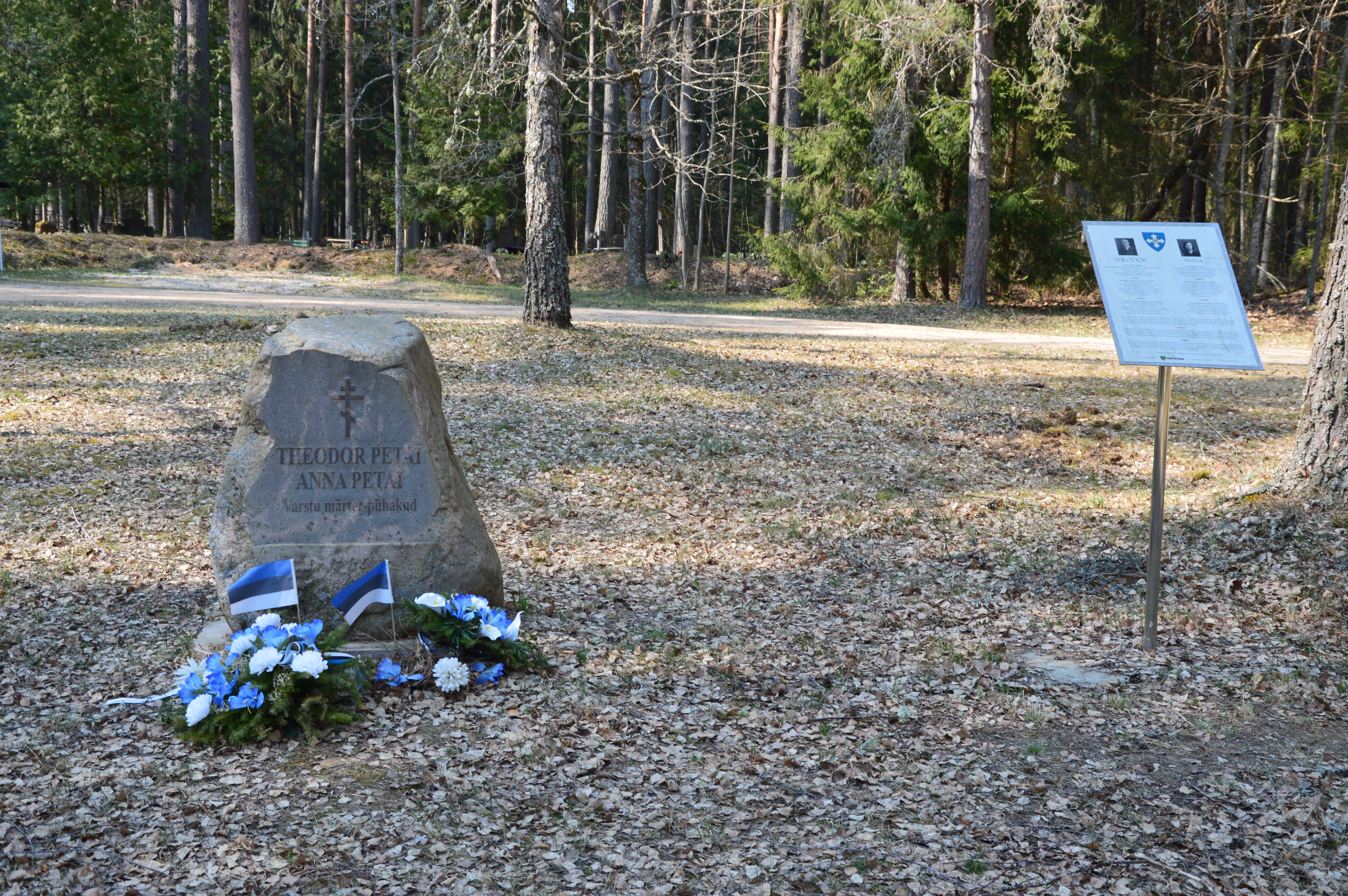 Mälestusmärk Mõniste-Ritsiku kiriku juures. Theodor Petai ja Anna Petai.